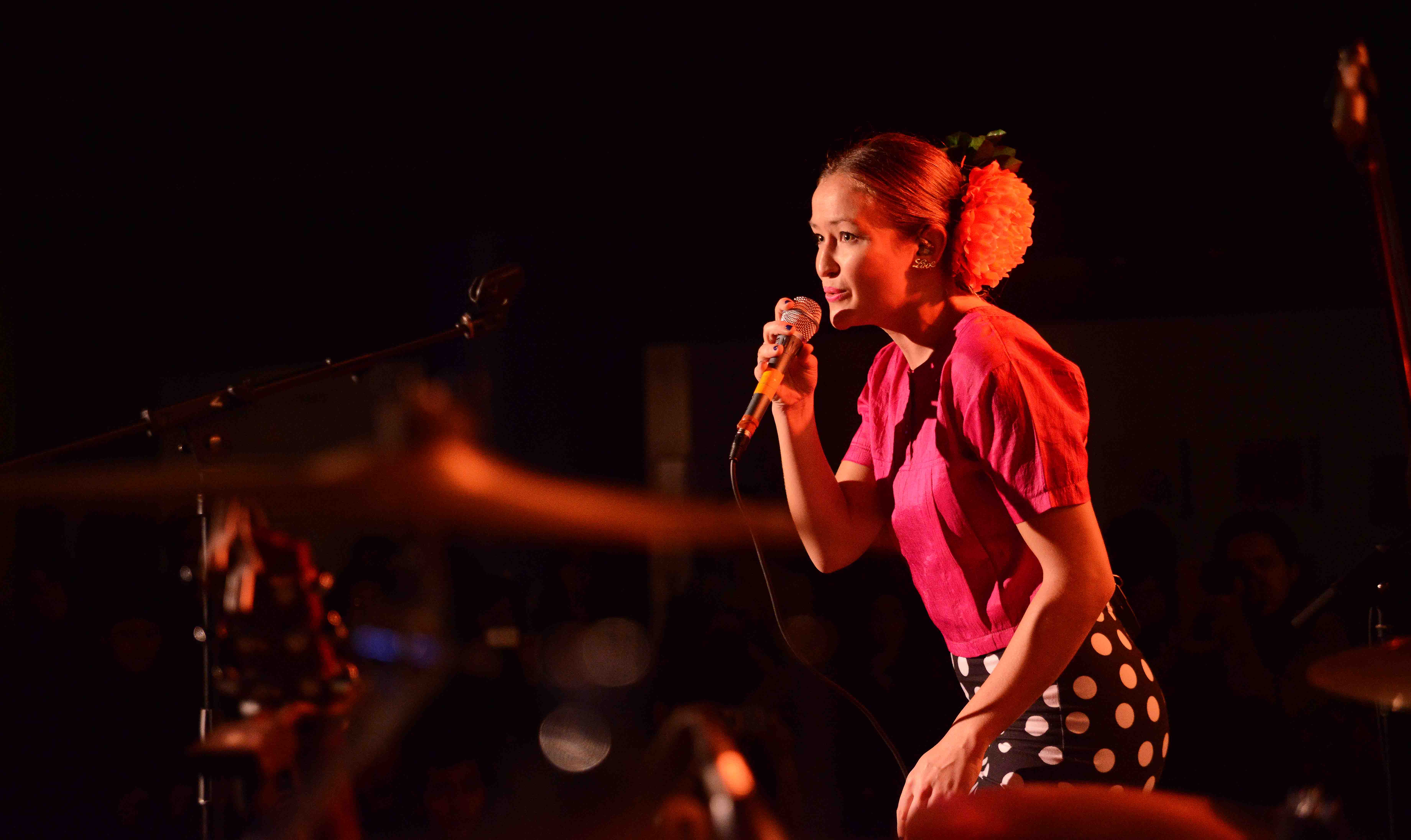 Puma Lab. Paz Court hace el Pre Lanzamiento de su nuevo disco "Cómeme" y de Invitada Carolina Nissen. Photos: Nico Santos